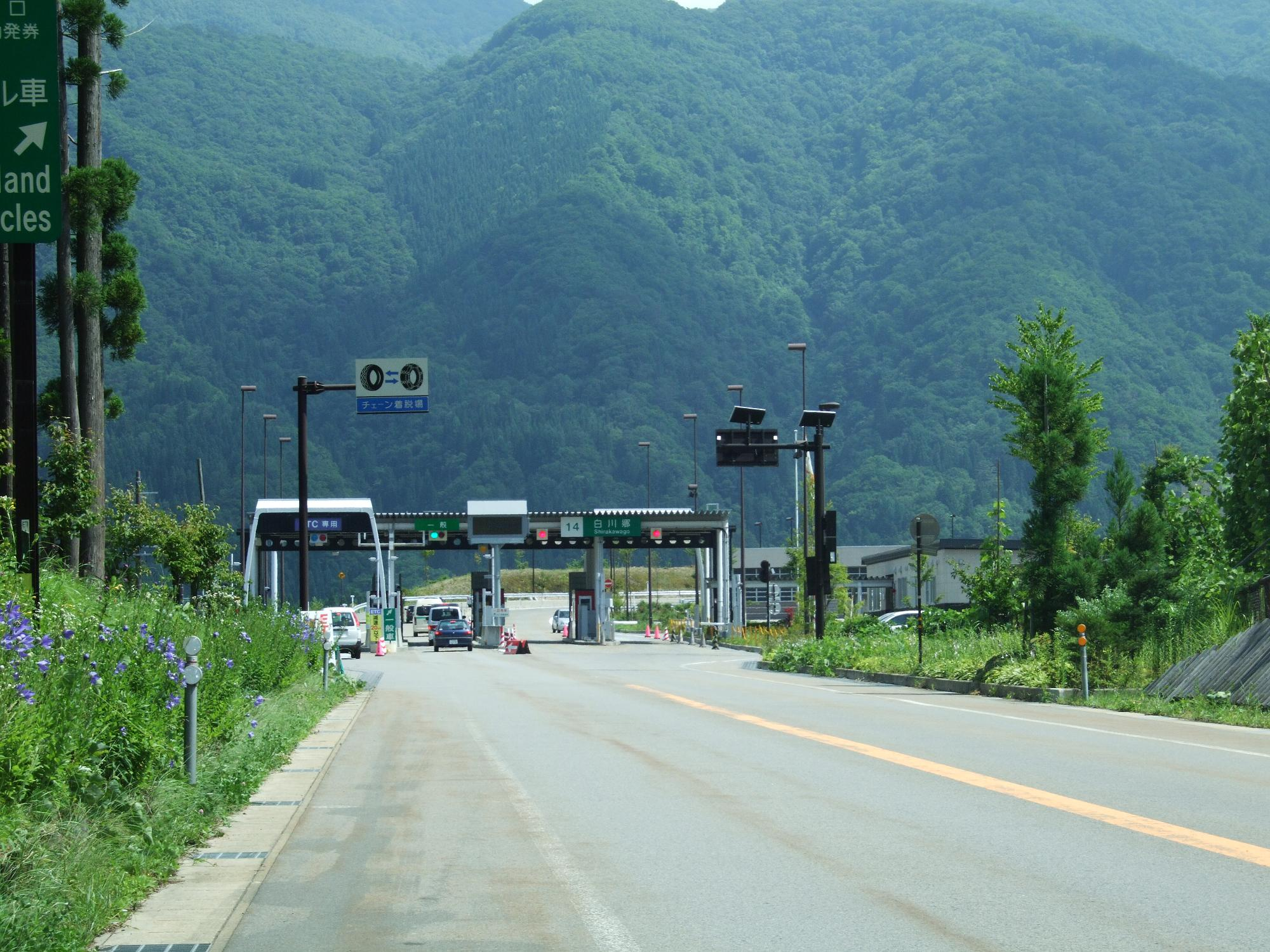 白川郷インターチェンジ （料金所入口）